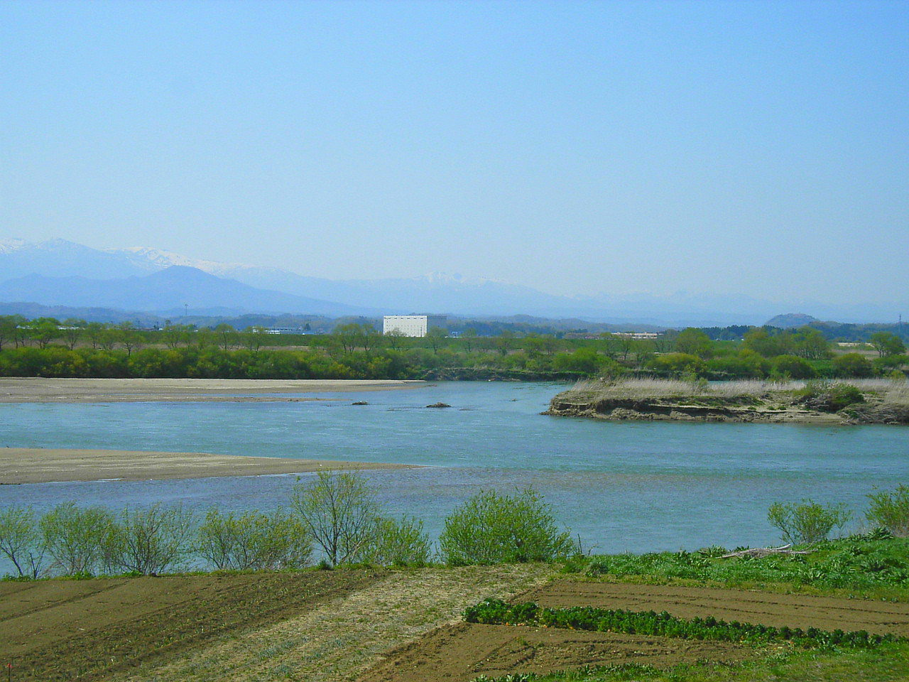 Abukuma River at Kakuda, Japan.